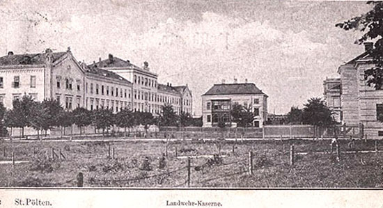 Landwehr-Kaserne in Sankt Pölten